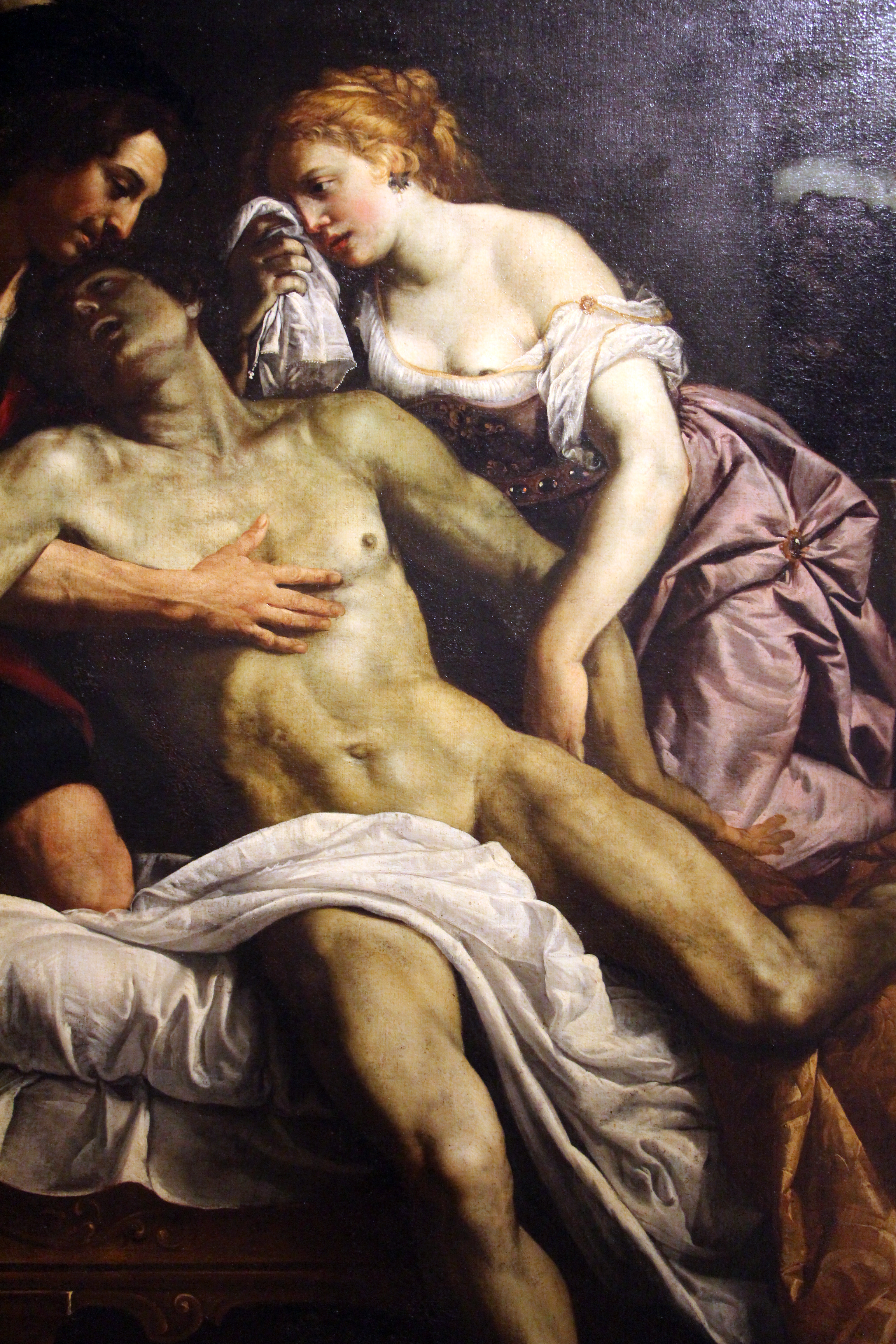 morte di meleagrotitle QS:P1476,it:"morte di meleagro" label QS:Lit,"morte di meleagro"